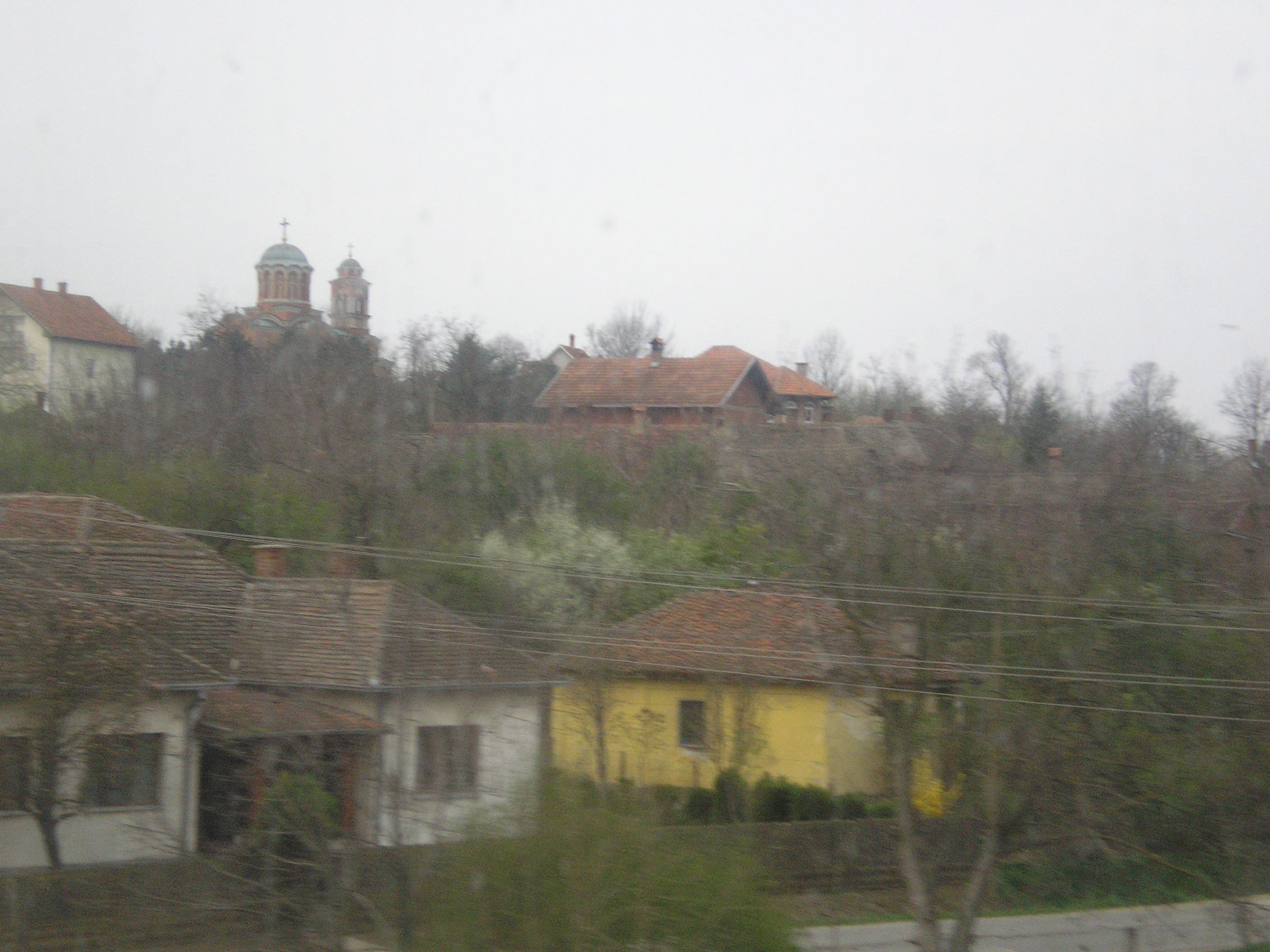 Krnjevo